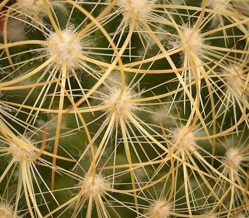 Mammillaria rhodantha ssp. pringlei